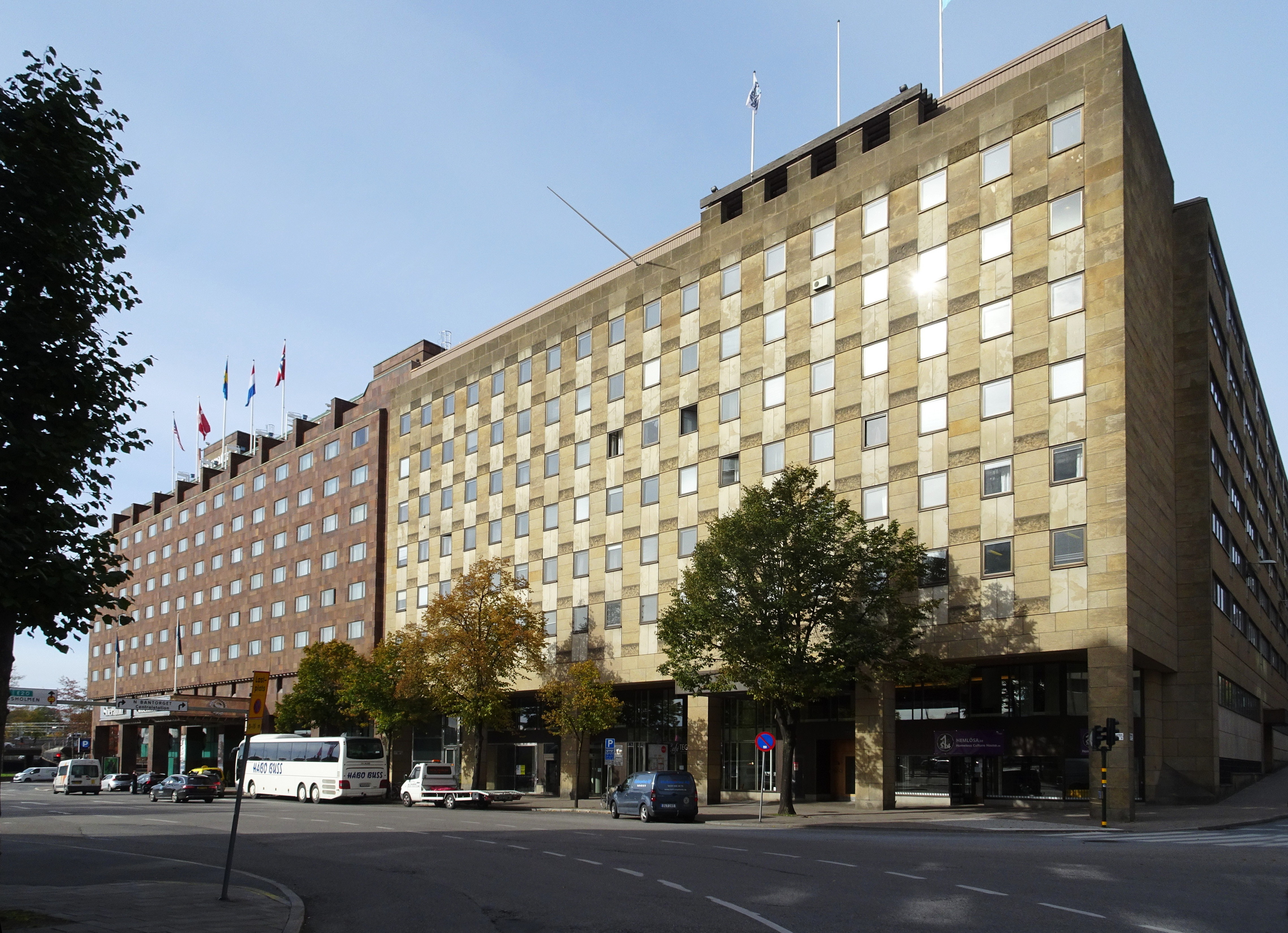 Kontorsfastigheten Snäckan 8 (Tegelbacken 4) byggt 1970-72. Arkitekt Erik Thelaus.